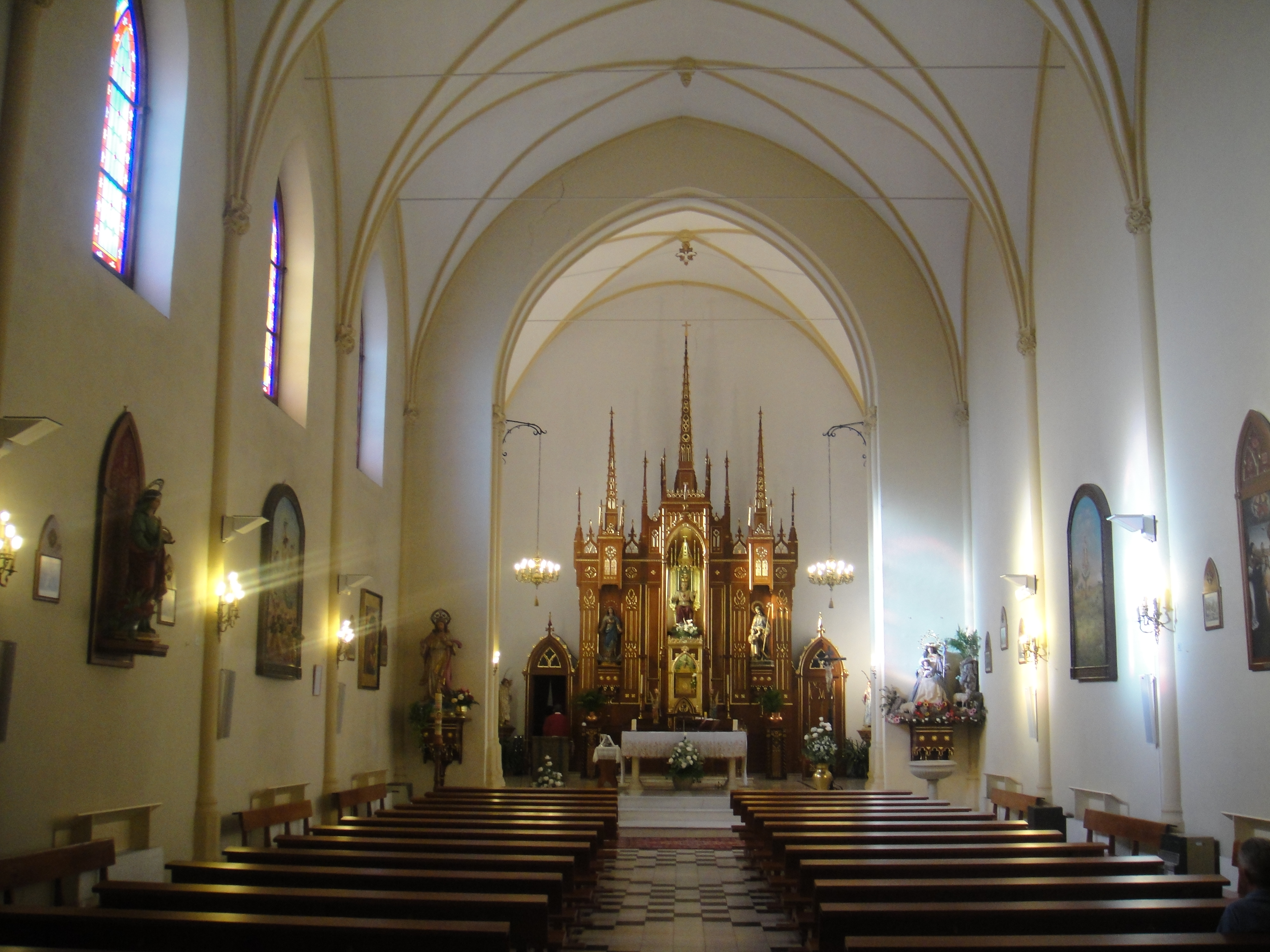 Vista general del interior de la iglesia de Cristo Rey de Villanueva de Córdoba, provincia de Córdoba, (España).